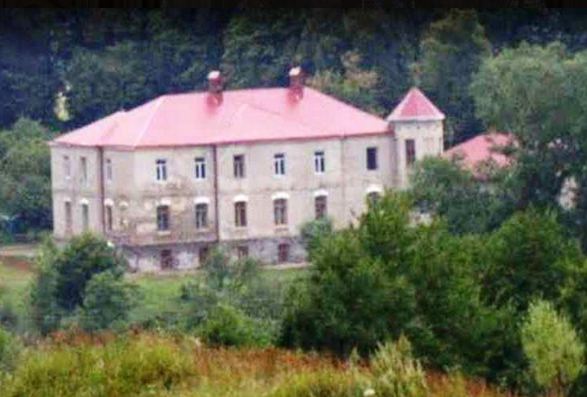 Ancien château du prince-abbé de Sozan